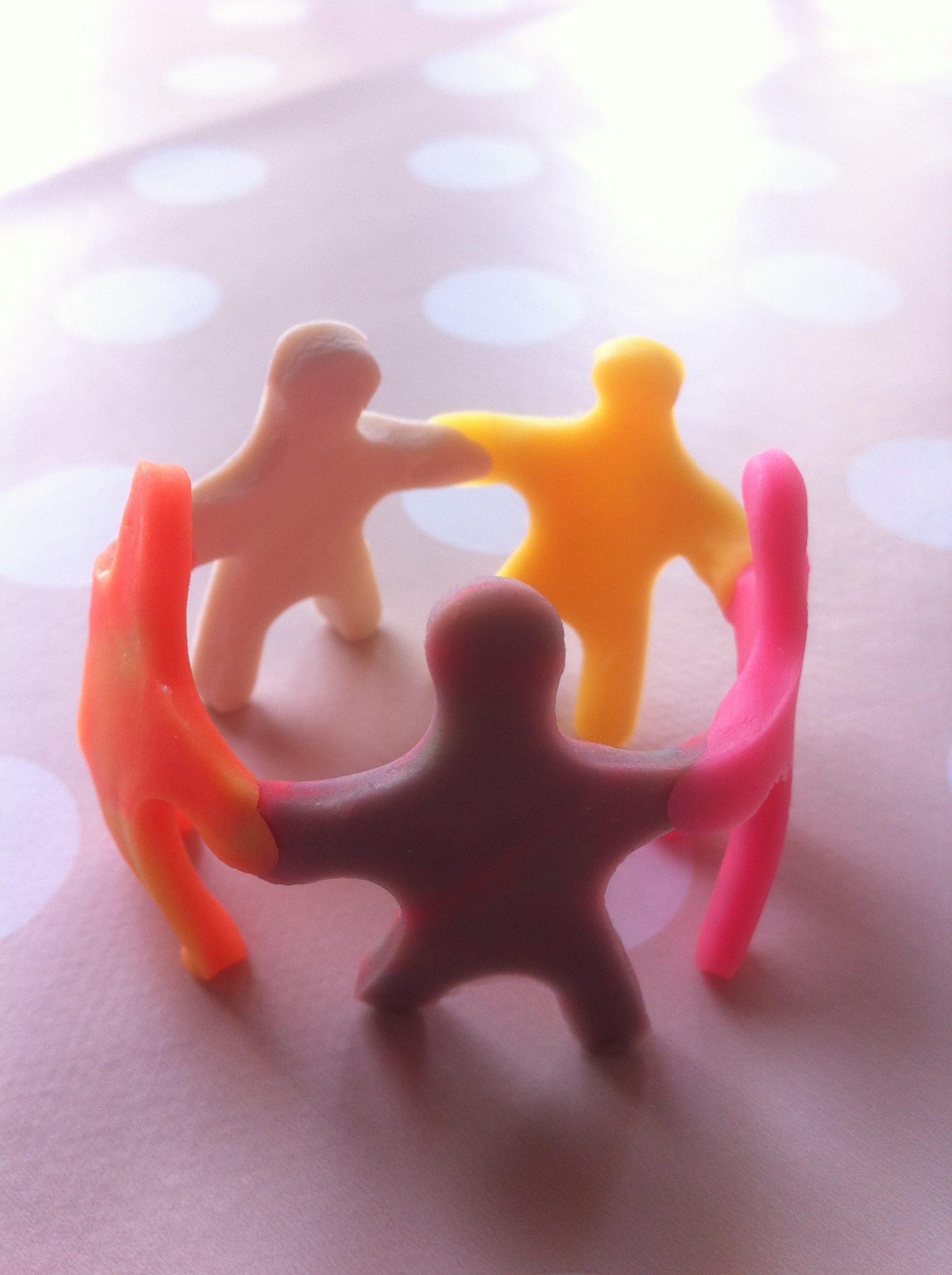 קבוצת חברים